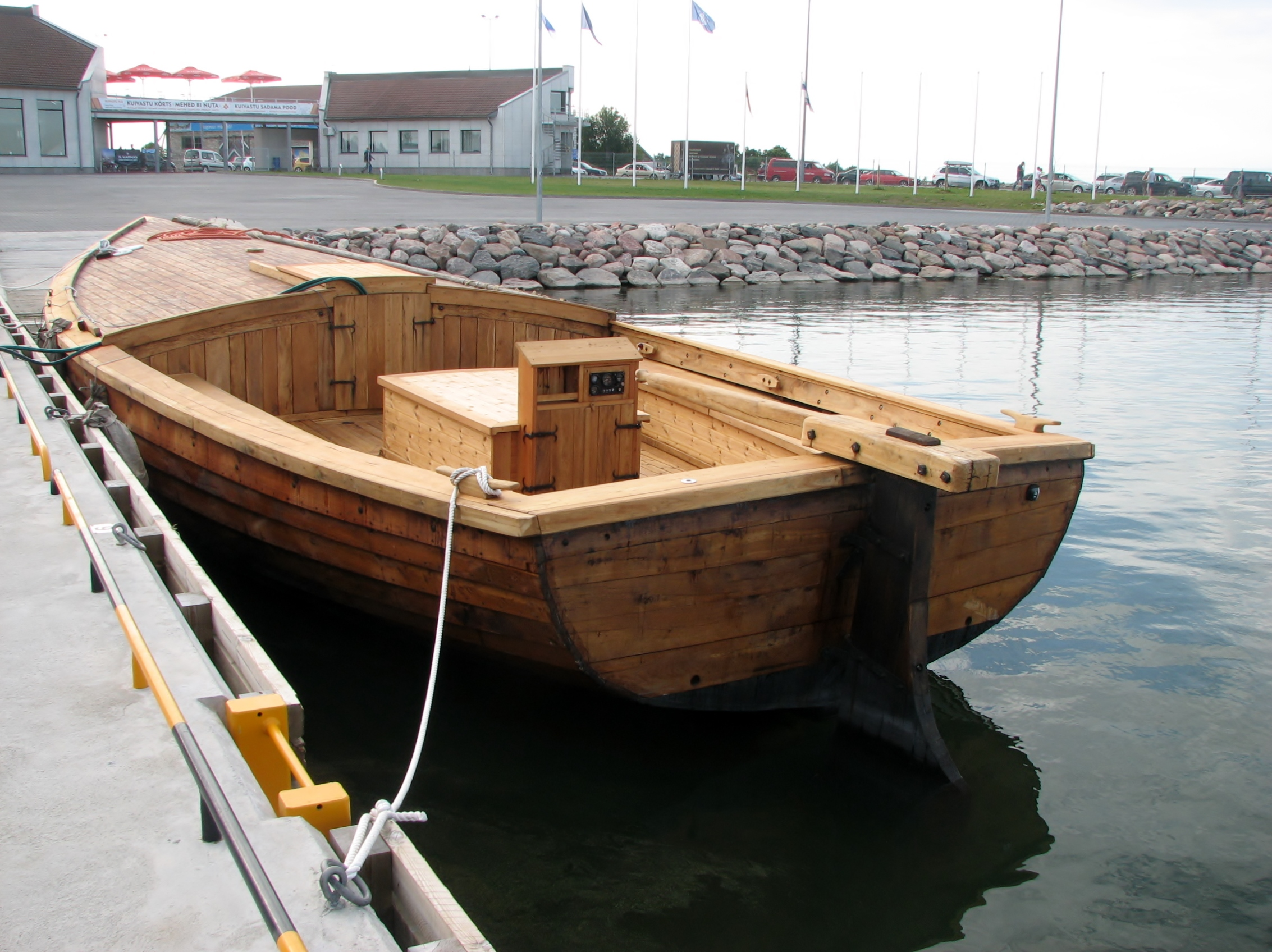 Moonland Kuivastu sadamas (tagaosa)